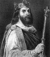 Louis II , roi de France (846-879) dit Louis le BègueLouis the Stammerertitle QS:P1476,fr:"Louis II , roi de France (846-879) dit Louis le Bègue" label QS:Lfr,"Louis II , roi de France (846-879) dit Louis le Bègue" label QS:Len,"Louis the Stammerer"